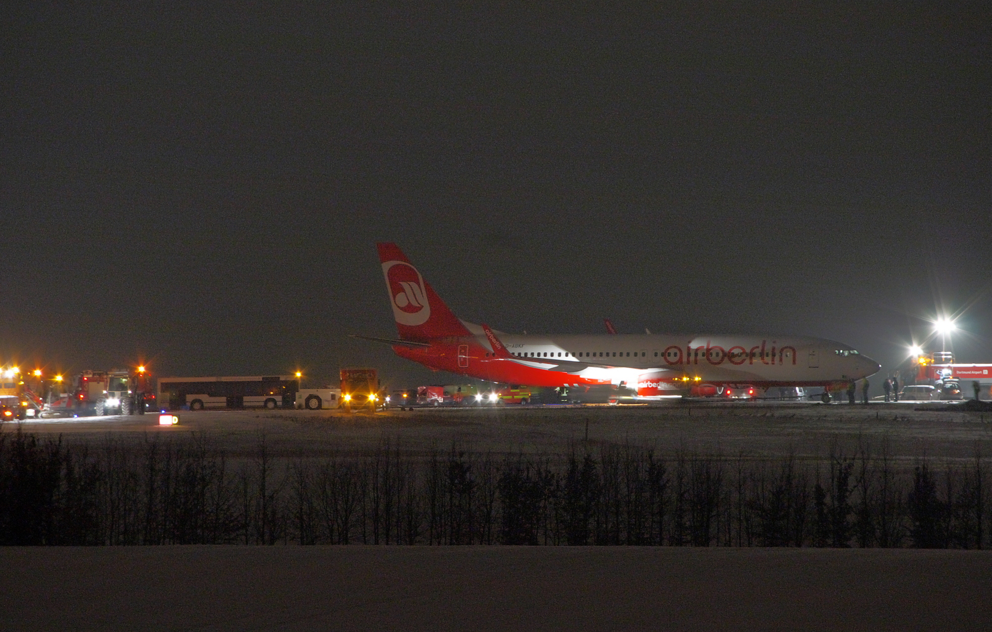 Nach Abbruch des Starts vom Flughafen Dortmund wegen eines technischen Defekts strandete diese Air Berlin Maschine im Grünen. Der Pressesprecher des Flughafen dementierte umgehend Nachrichten, die Startbahn sei möglicherweise vereist gewesen.